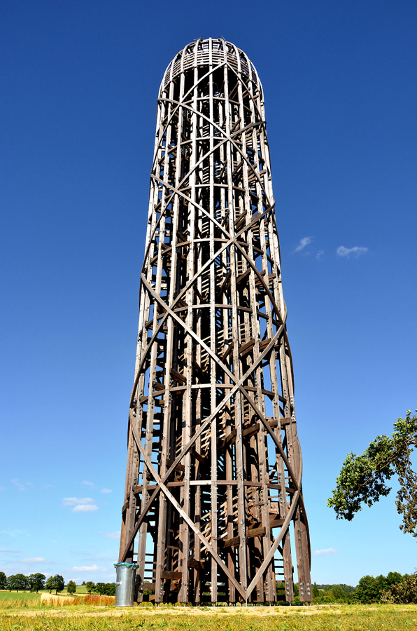 Dřevěná rozhledna v obci Heřmanice na severu Čech.